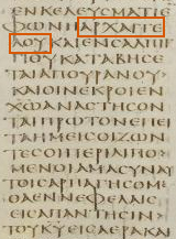 Fragmento del libro de 1 Tesalonicenses 4:16